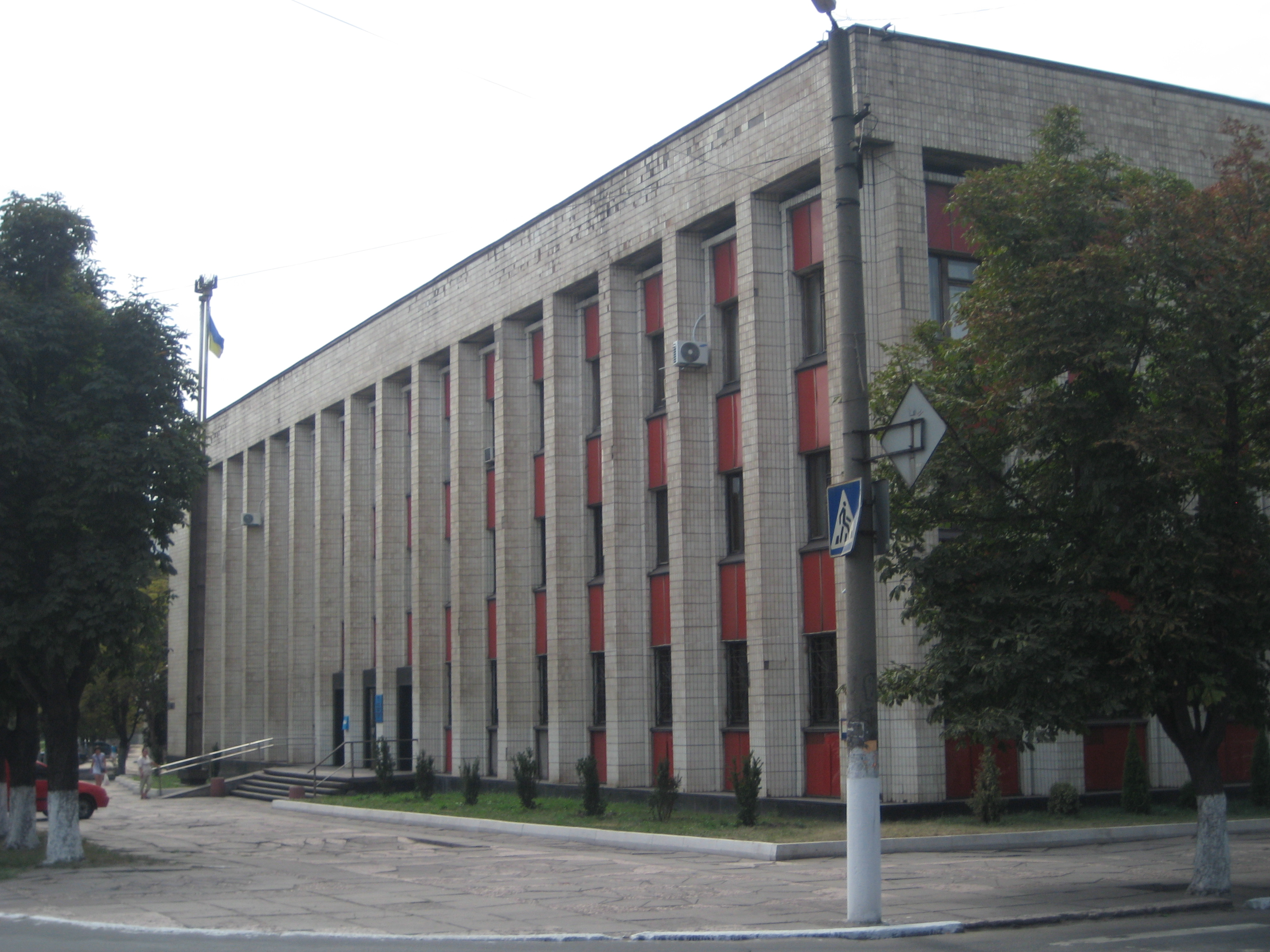 Заводська районна рада міста Дніпродзержинськ